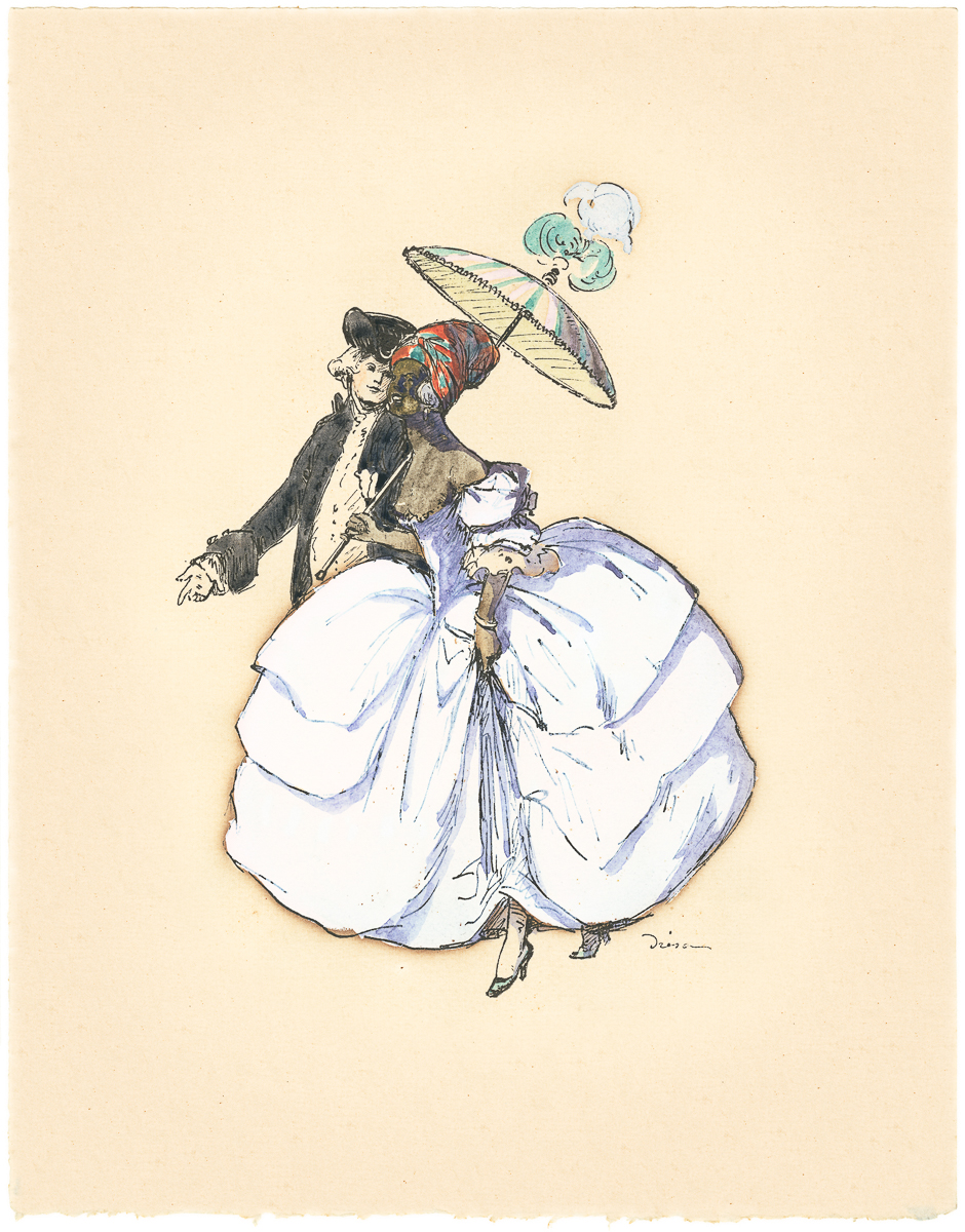 Princesses imaginaires. Estampes-aquarelles. Drésa 1919